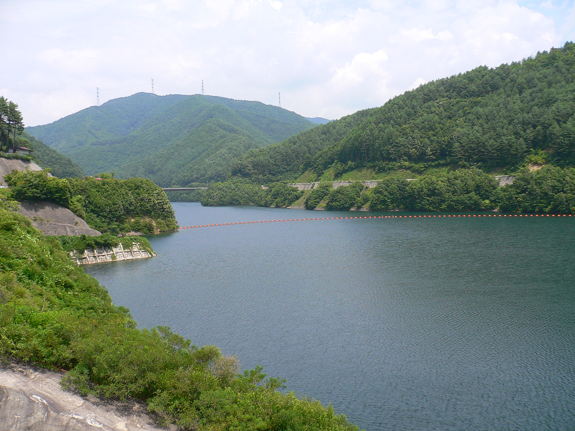 箕輪ダム湖＝もみじ湖 2005.07.30 ozawajun撮影